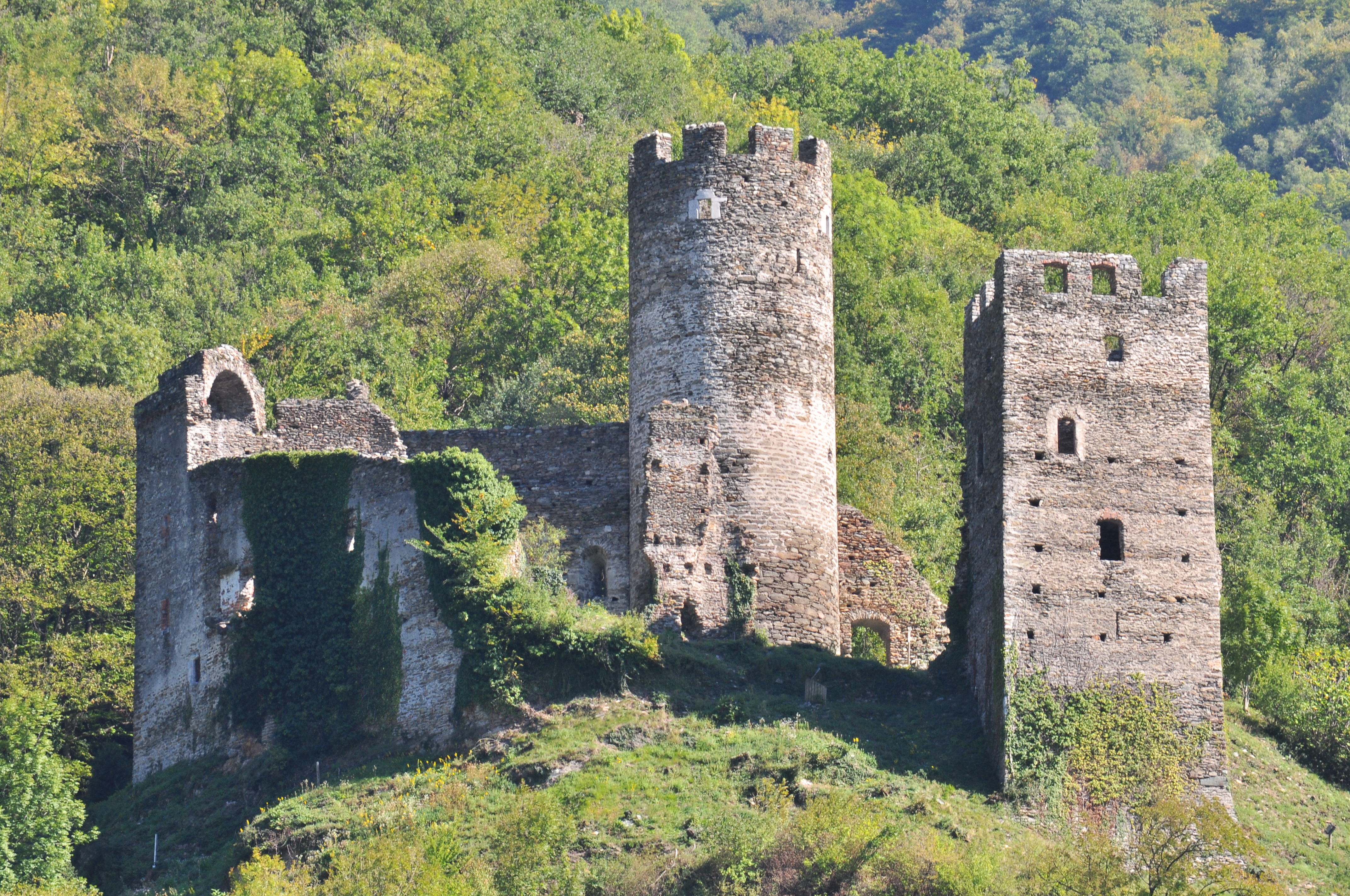 Château de Chantemerle